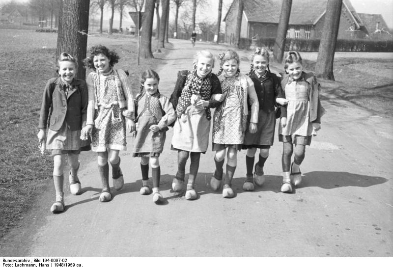 Holzschuhe. Schultag in Holtwick